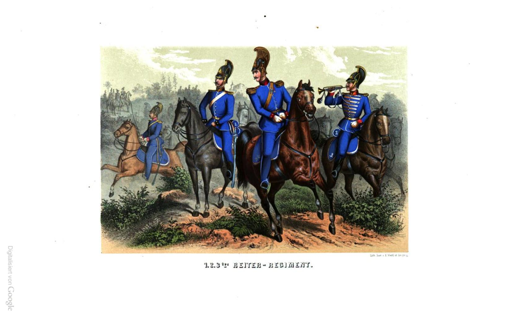 sächsische Uniformen Kavallerie 1859